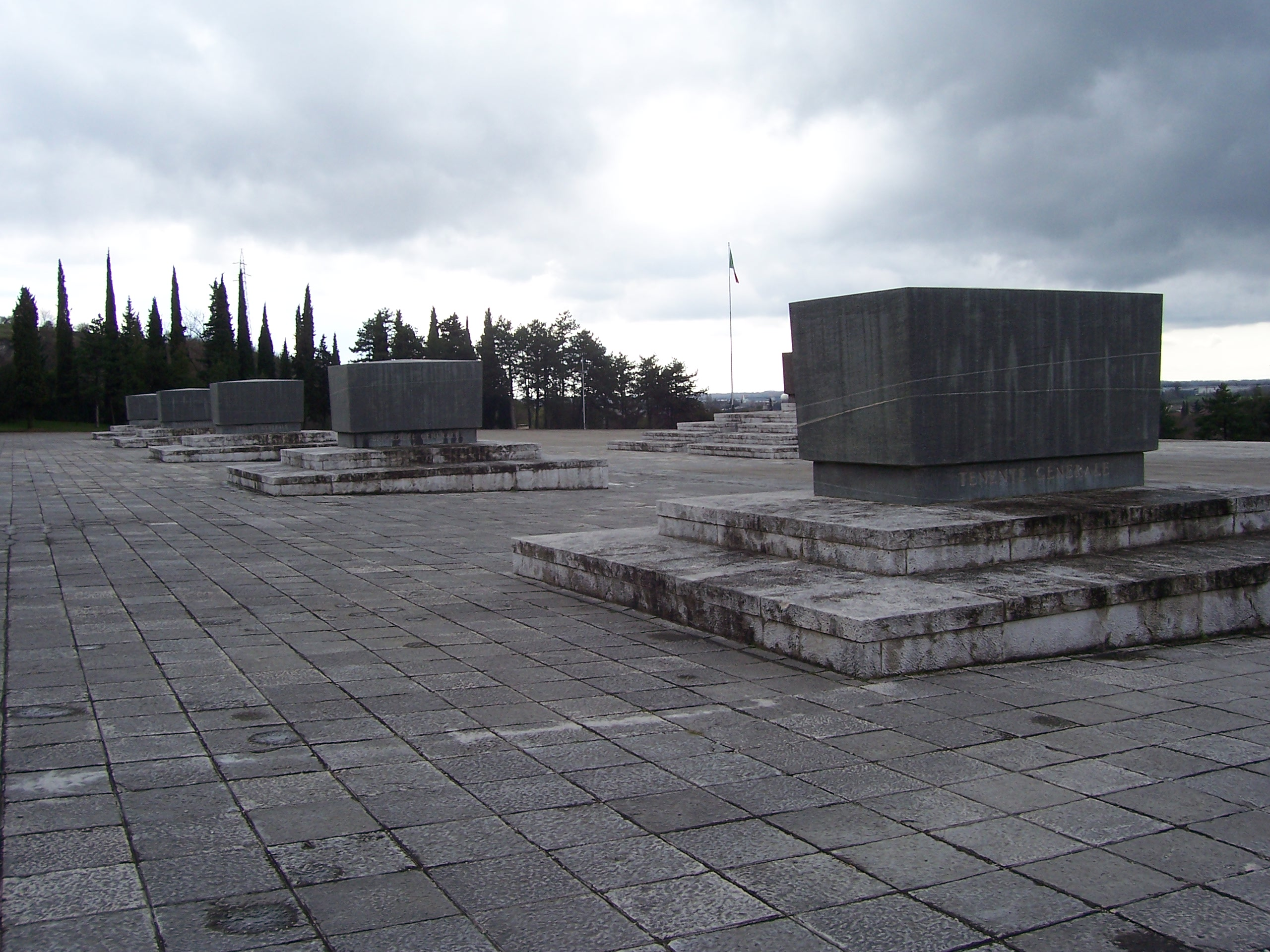 Base del sacrario di Redipuglia, tombe dei generali